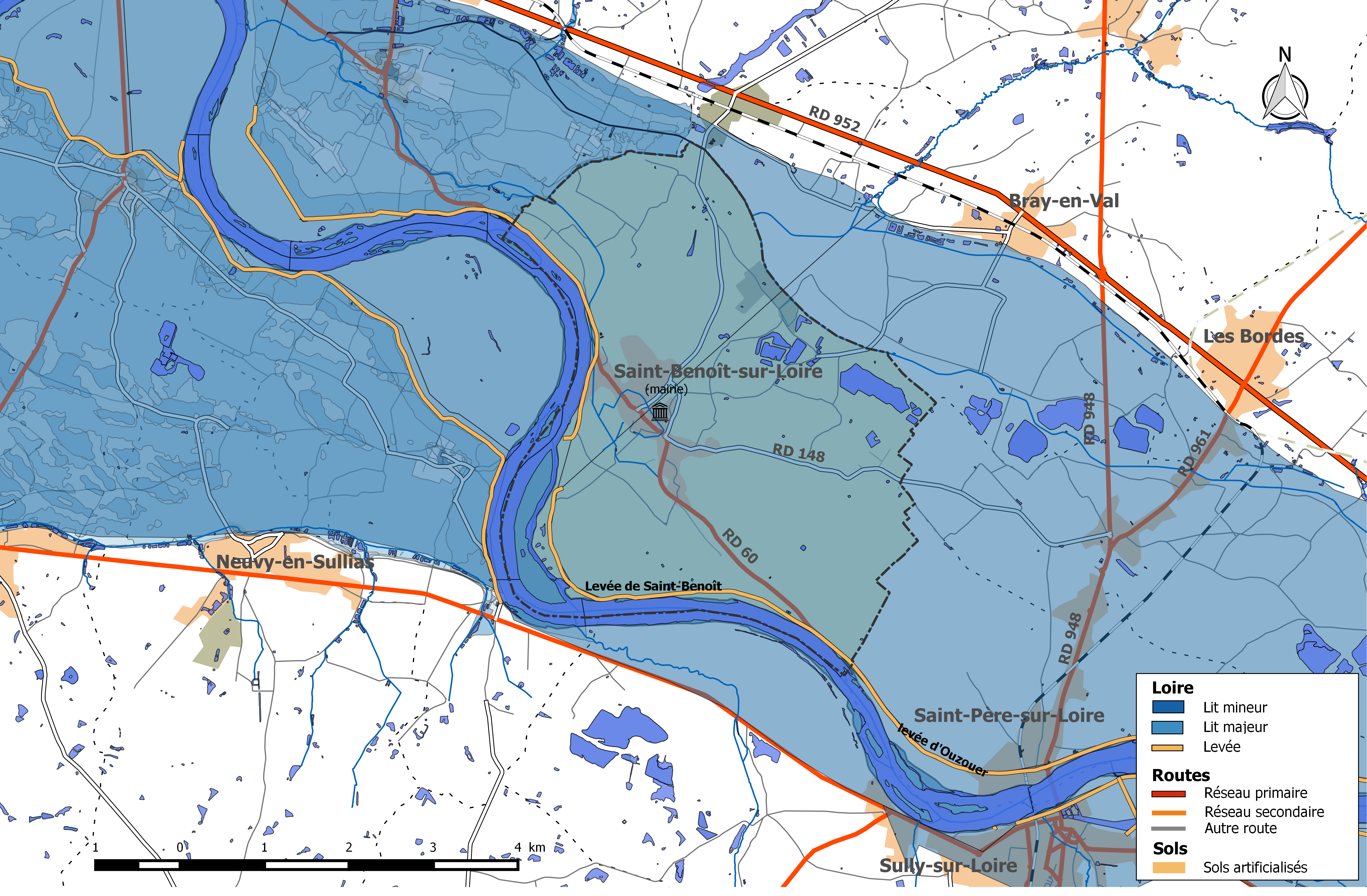 Zone inondable et réseaux hydrographique et routier de la commune de Saint-Benoît-sur-Loire.